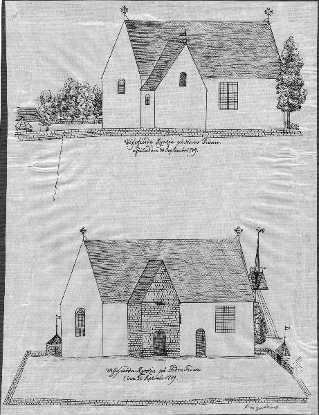 Vissefjärda kyrka mot norr och mot söder. Teckning av Petrus Frigelius från 1749.